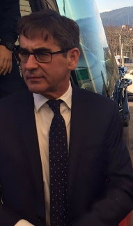 Fernando Vázquez minutos antes de empezar un partido con el Mallorca